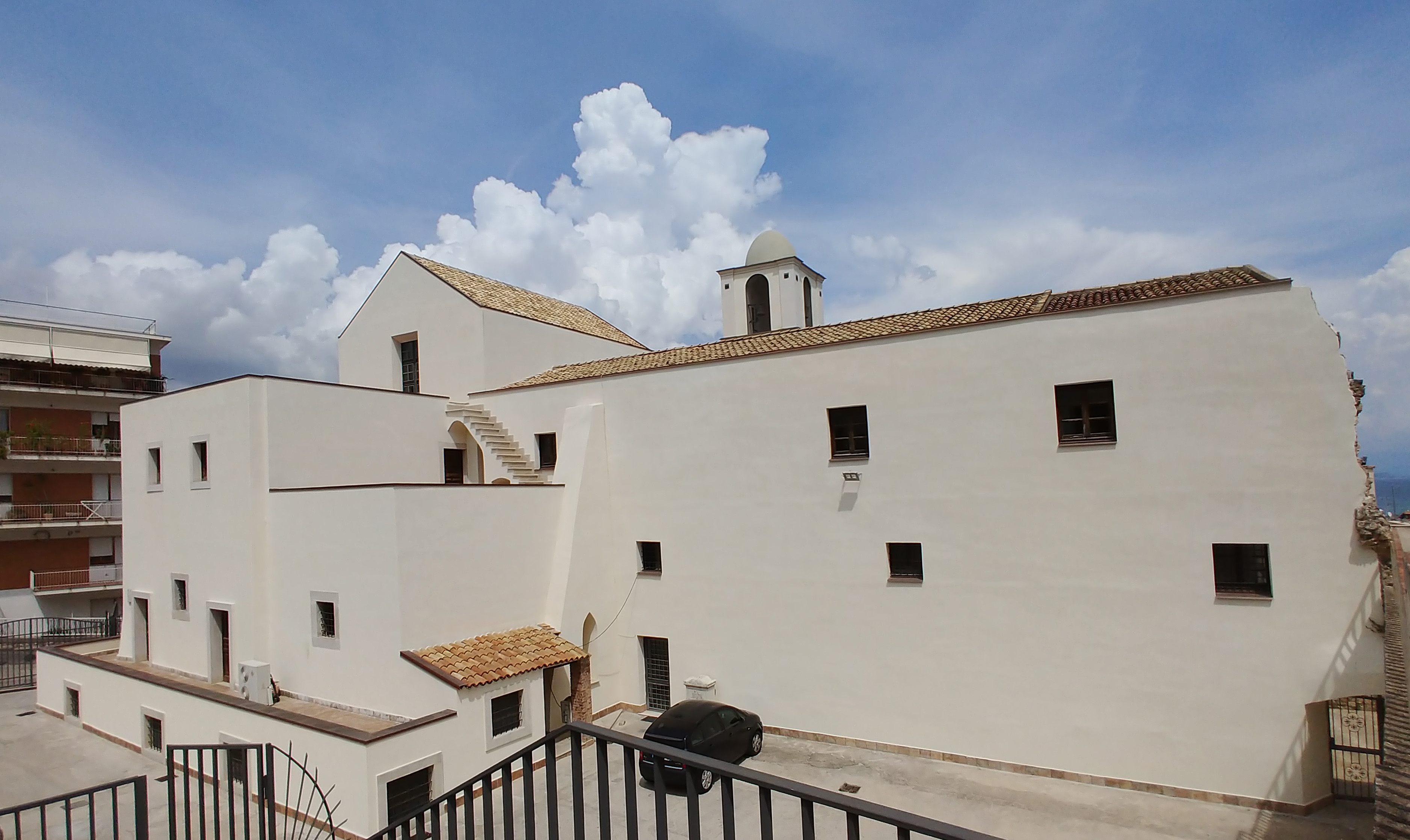 Veduta posteriore dell'abside e dell'ex convento.